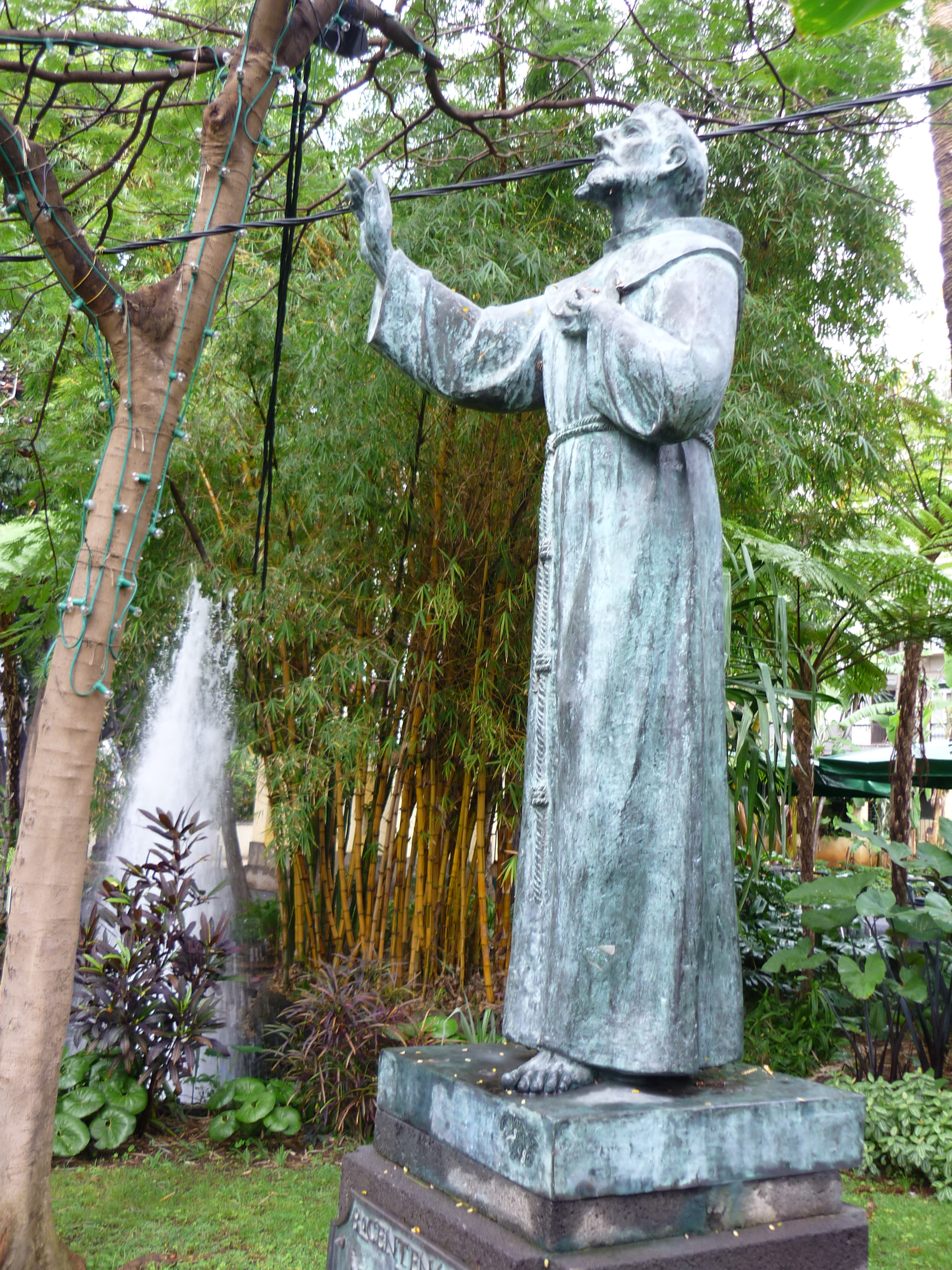 Assisi Szent Ferenc szobra Funchalban, a Városi kertben (Jaime Santos alkotása, 1982)